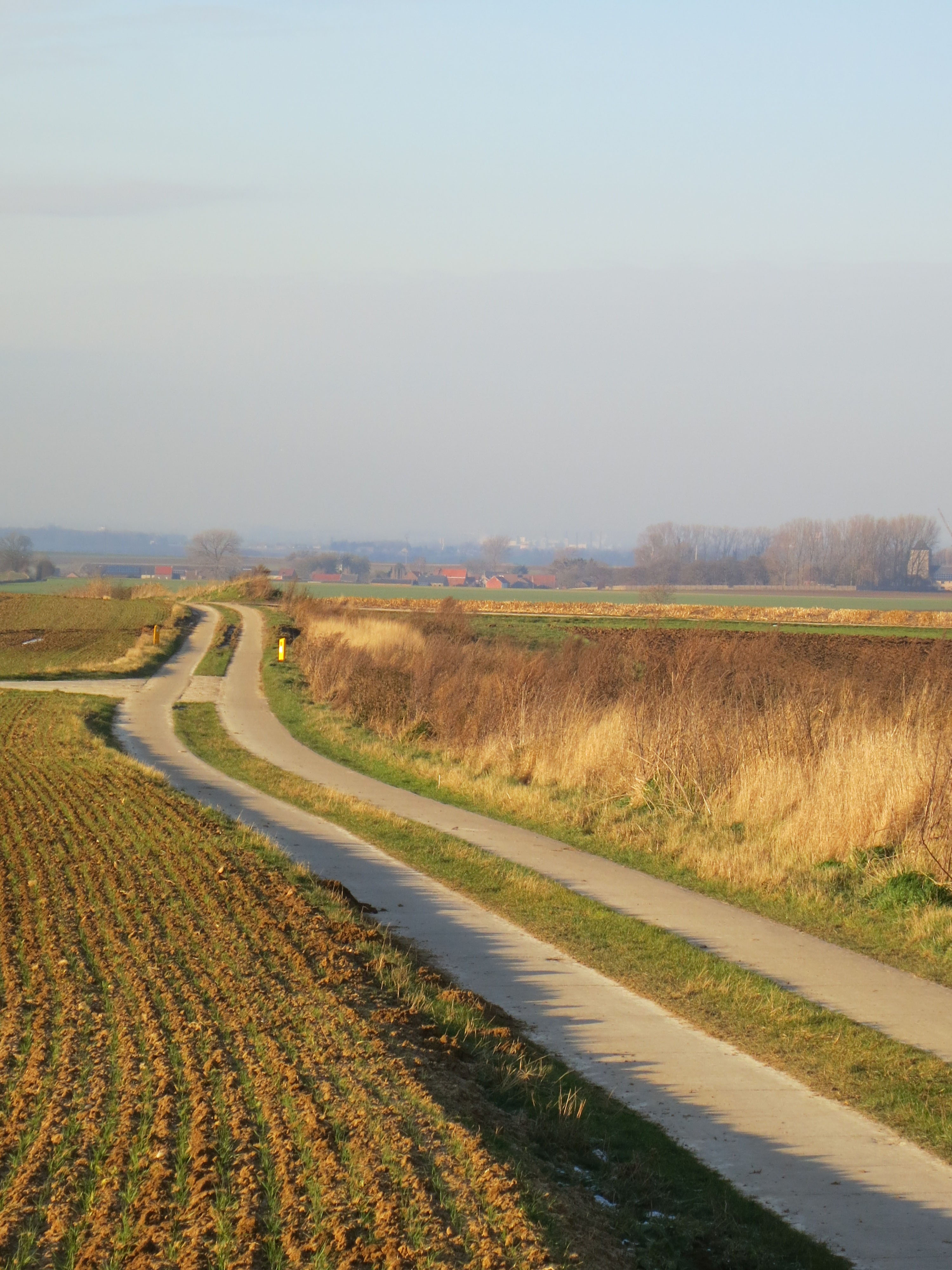 Verkaveling Lincent